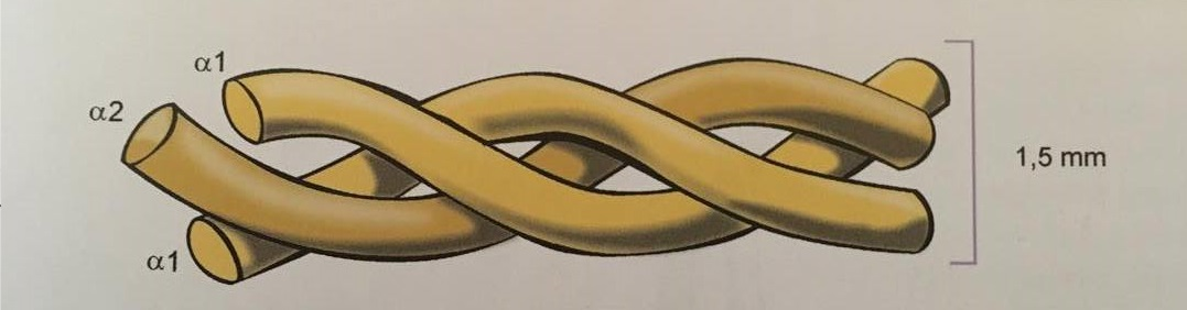 Tripla helikális szerkezet